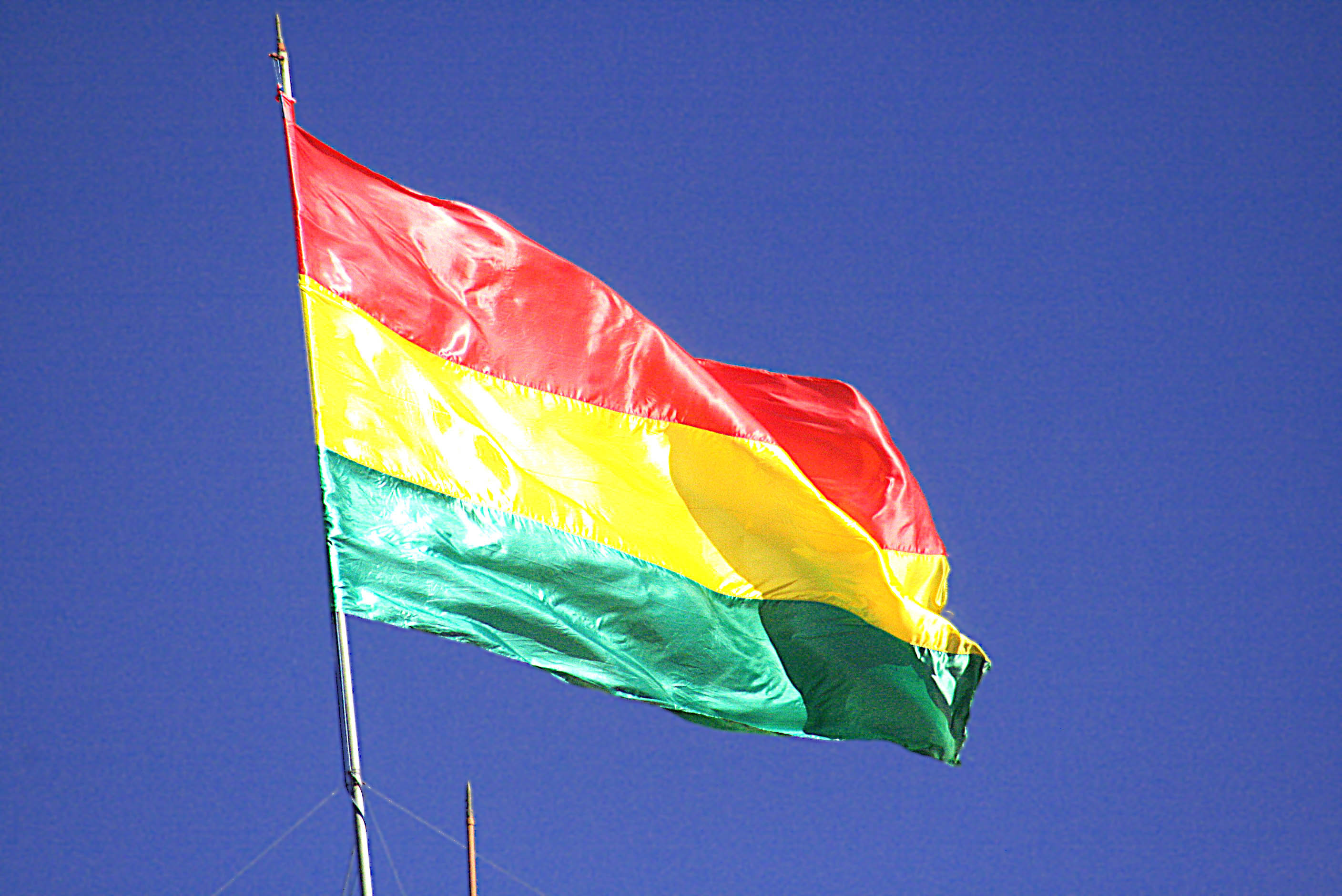 Os bolivianos são bem patrióticos, colocam bandeiras por todo lado. Então julguei esta ser uma boa capa para o álbum.